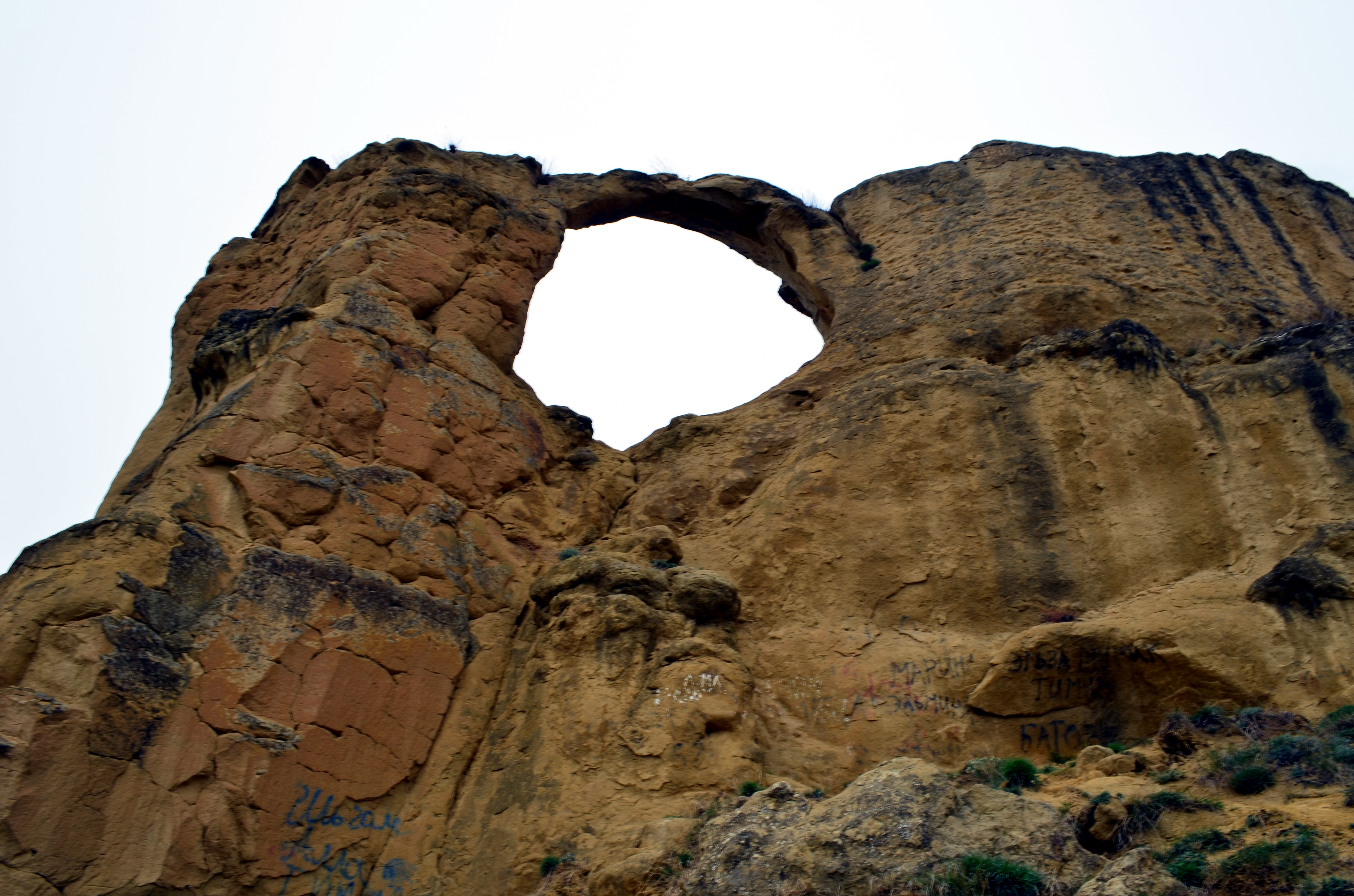 Гора Кольцо: Северная окраина г. Кисловодска, отрог южного склона хр. Боргустан, Кисловодск, Ставропольский край This image is related to the protected area of Russia number 2610067